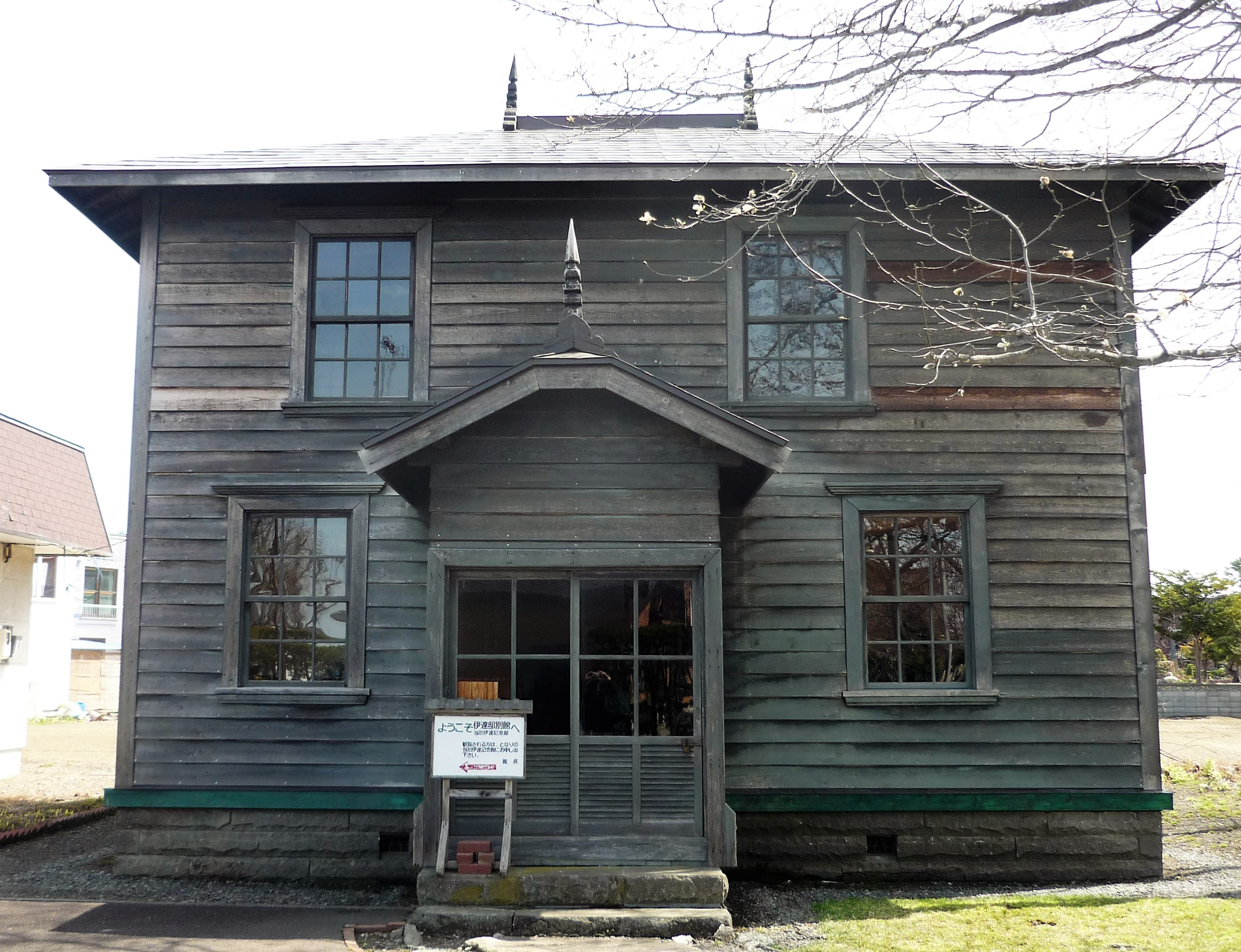 石狩郡当別町の伊達邸別館